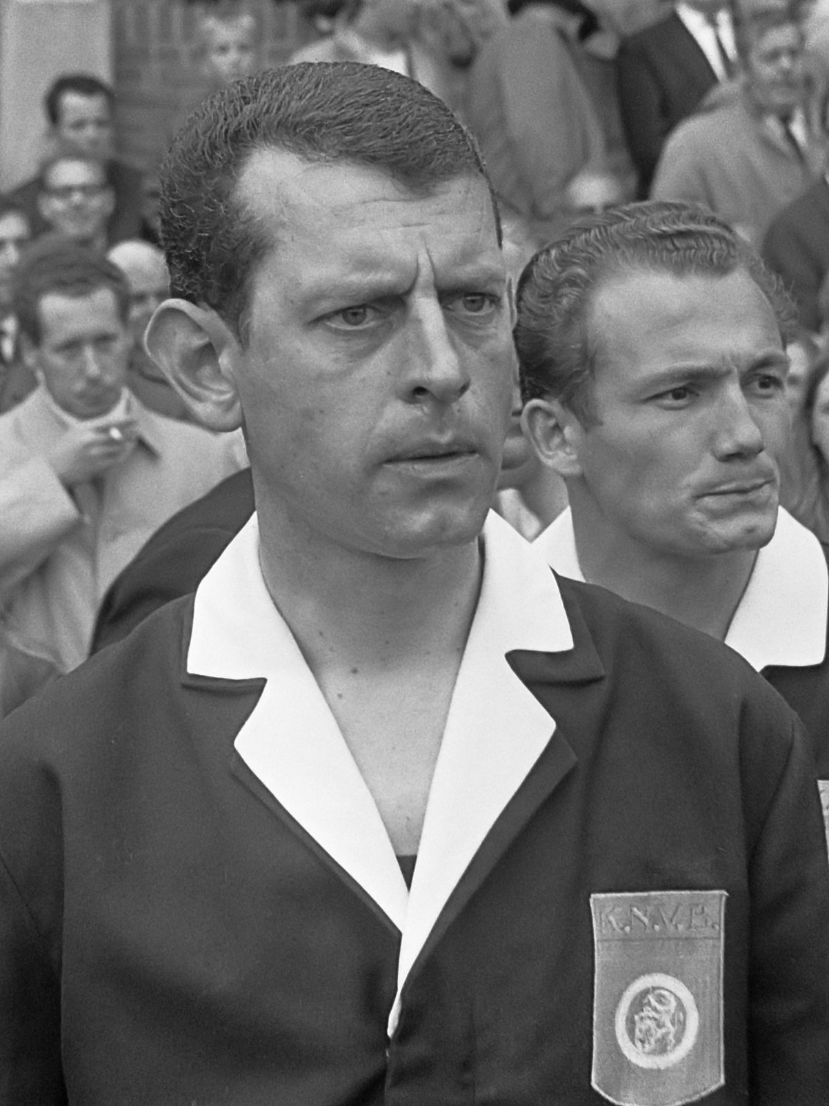 NAC tegen Feyenoord 0-4, nr. 12 scheidsrechter Boosten 24 augustus 1969